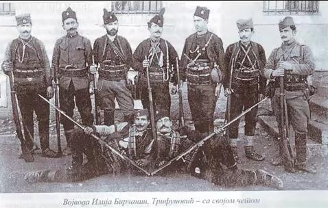 Ilija_Trifunovic_Bircanin